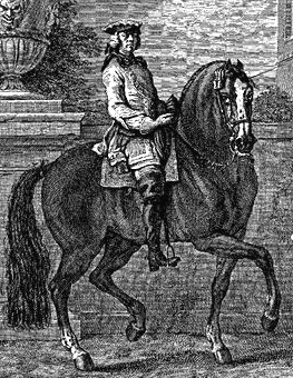 Le rassembler